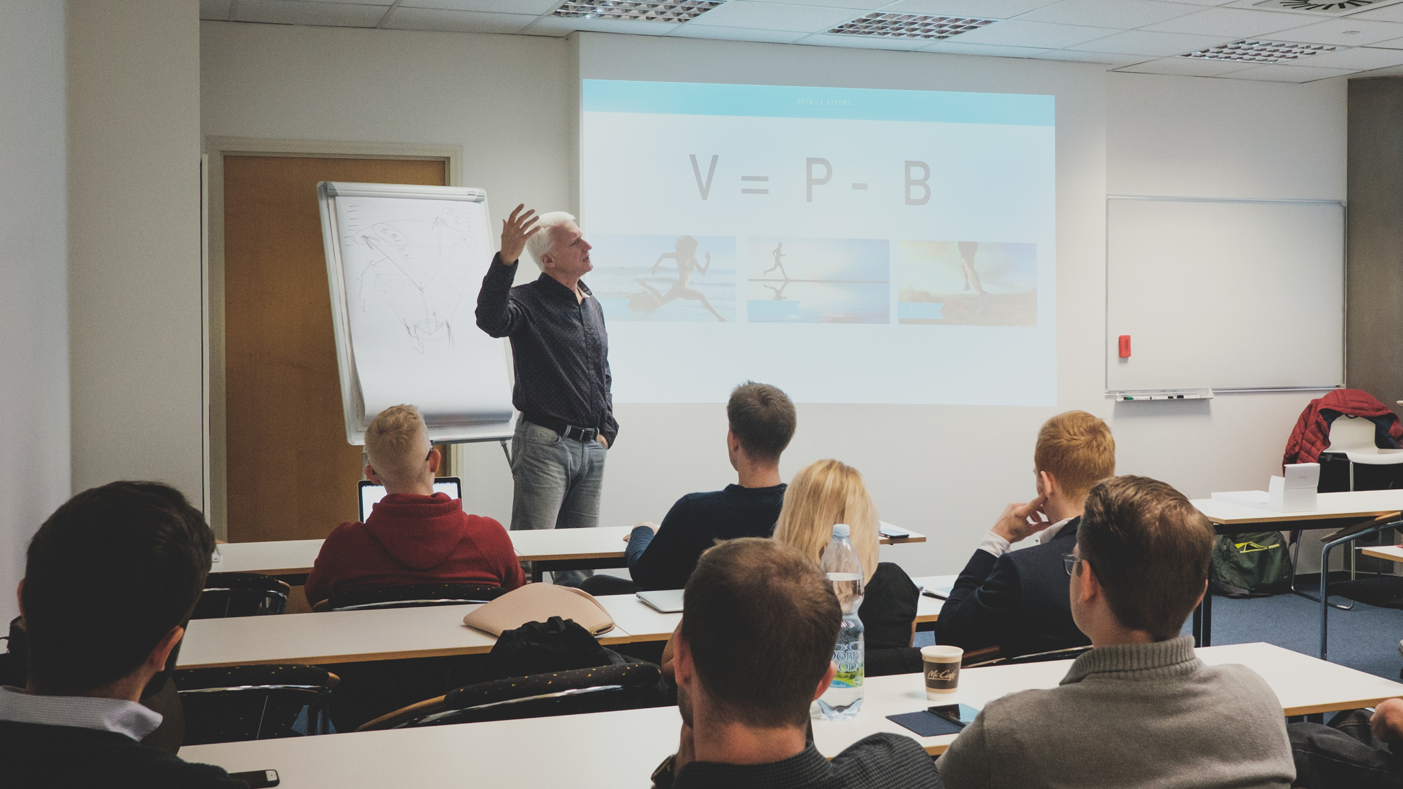 Kouč a bývalý hokejový trenér přednáší studentům na NEWTON College.